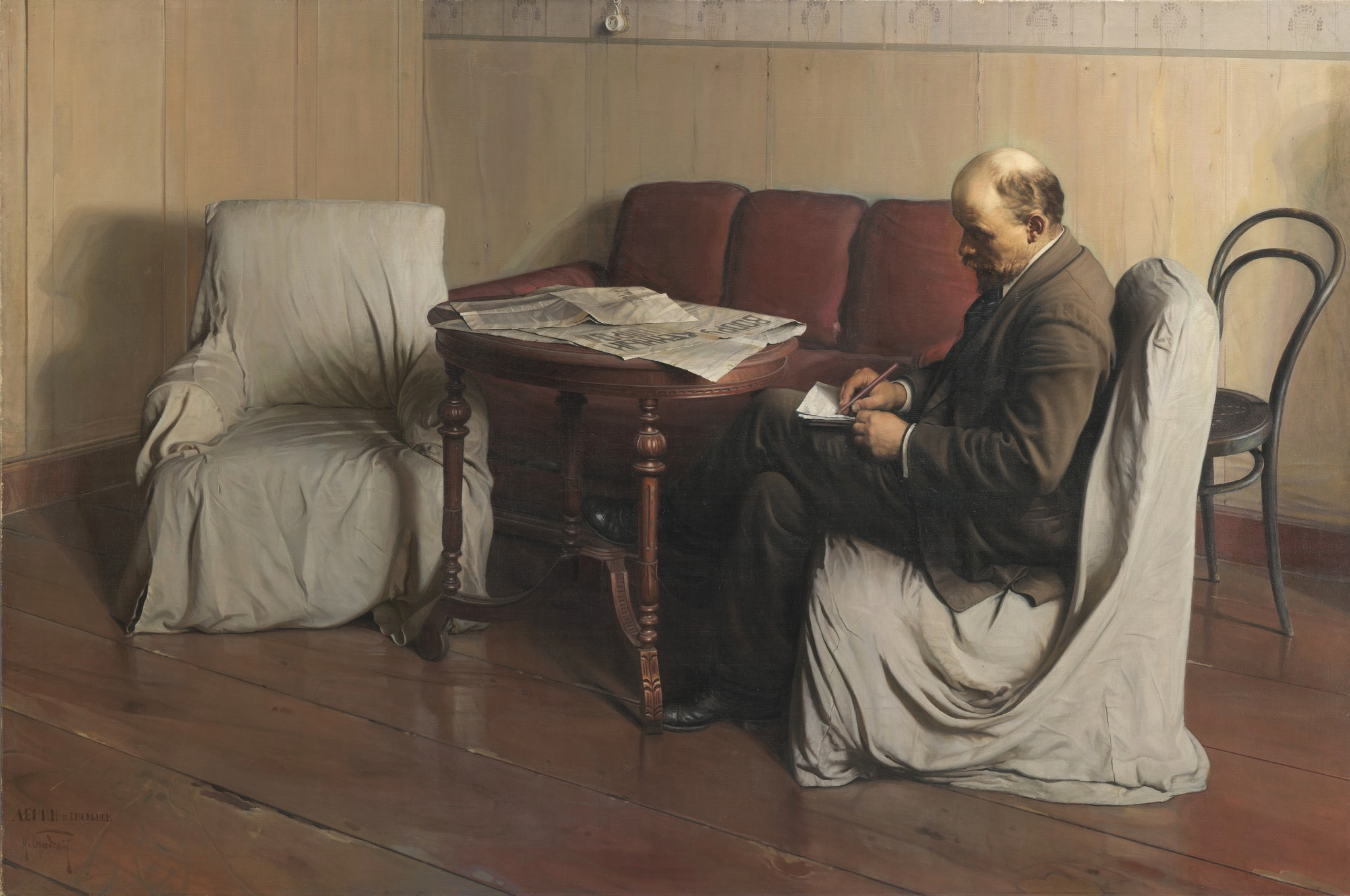 "В.И. Ленин в Смольном в 1917 году". 1930 г. Бердянский художественный музей имени И.И. Бродского, Третьяковская галерея. Lenin in Smolniy in 1917